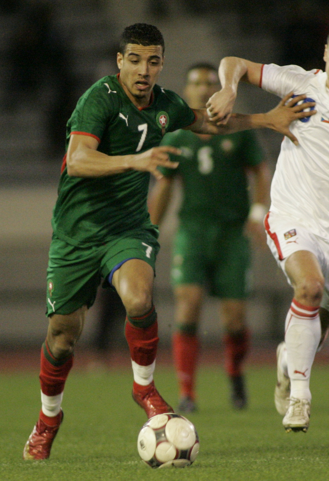 Nabil dirar . marek matejovsky